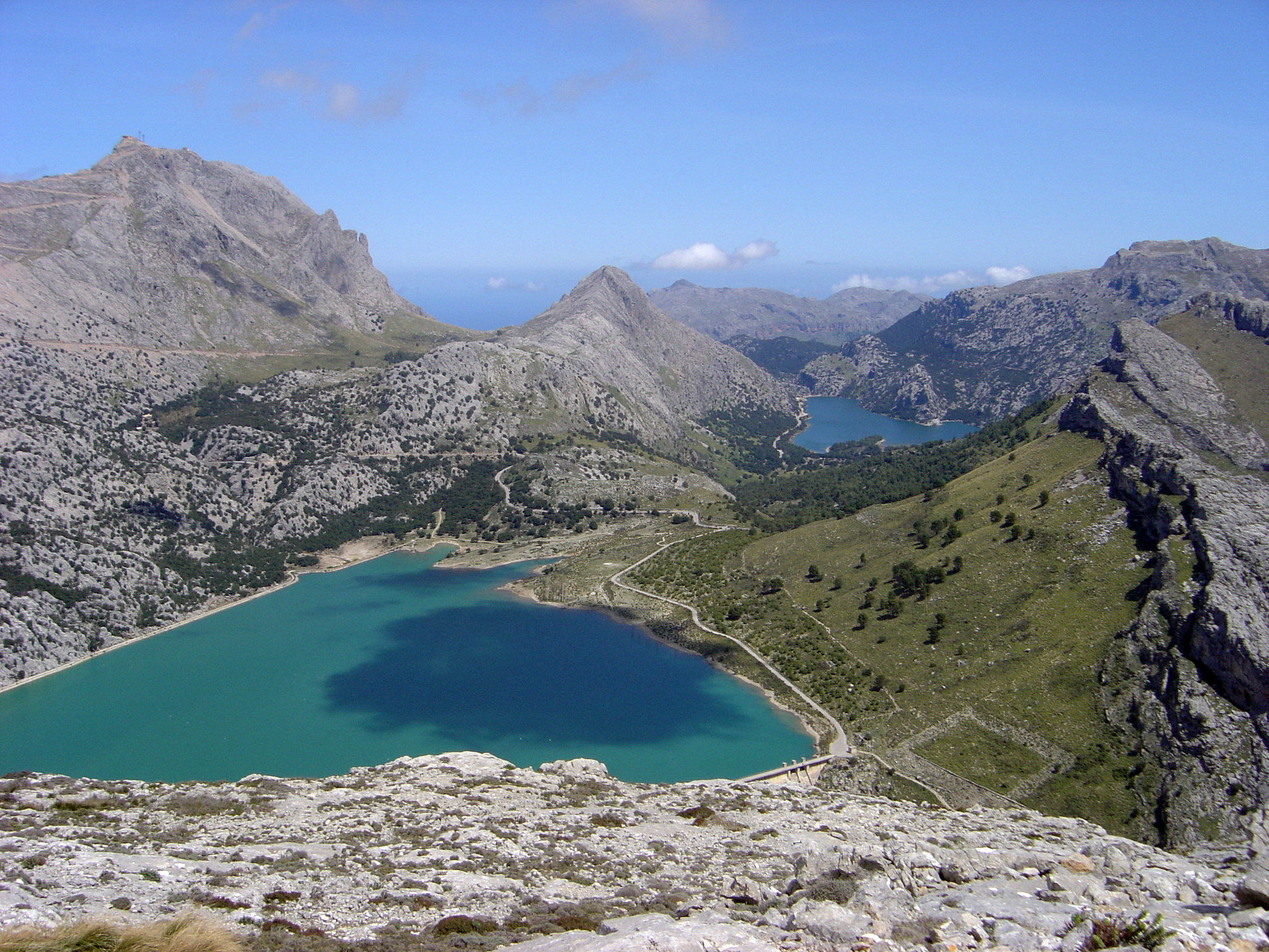 El Puig Major. Escorca. Mallorca.